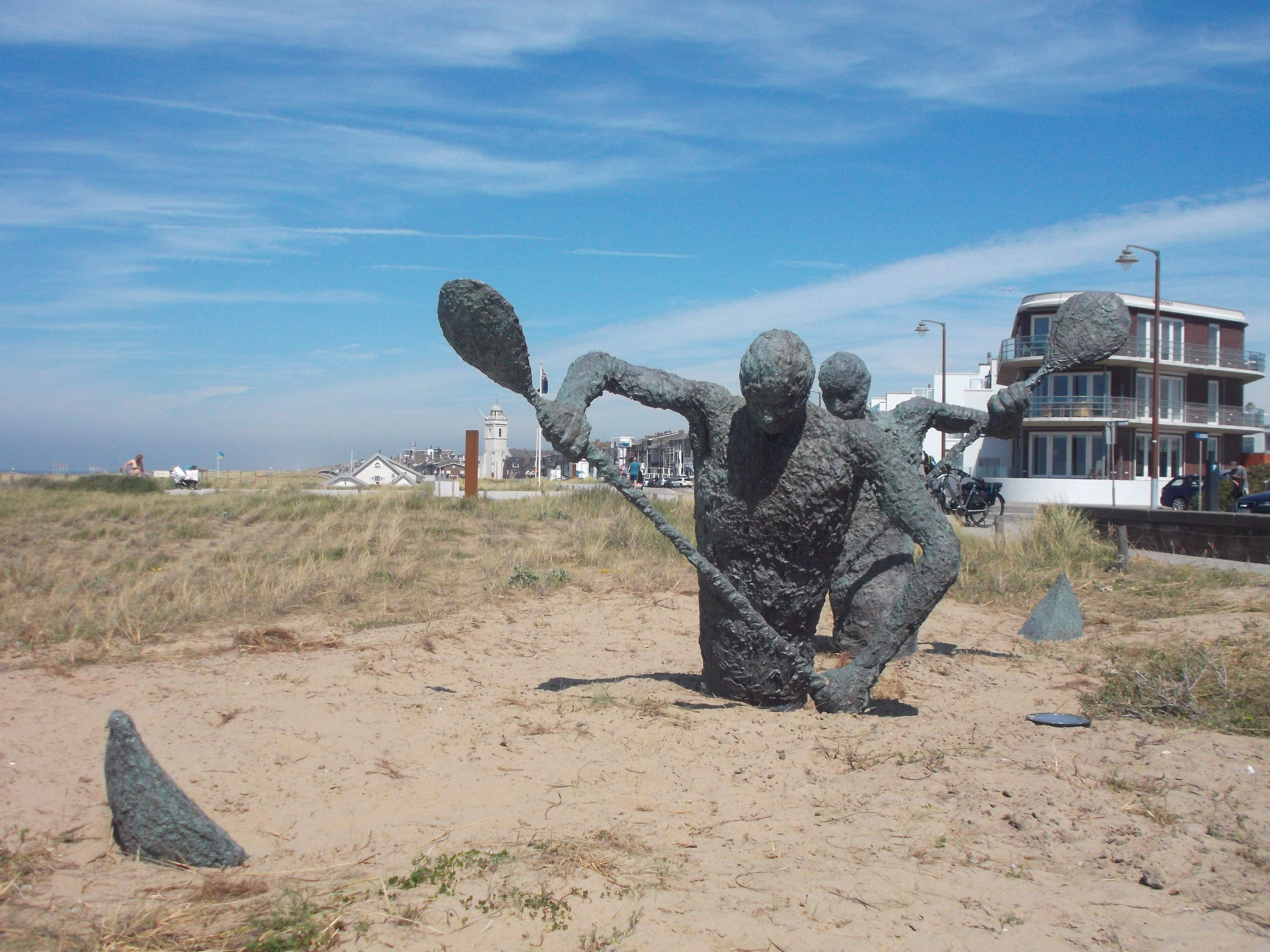 Beeld van twee personen die op een kano varen. Engelandvaarders.